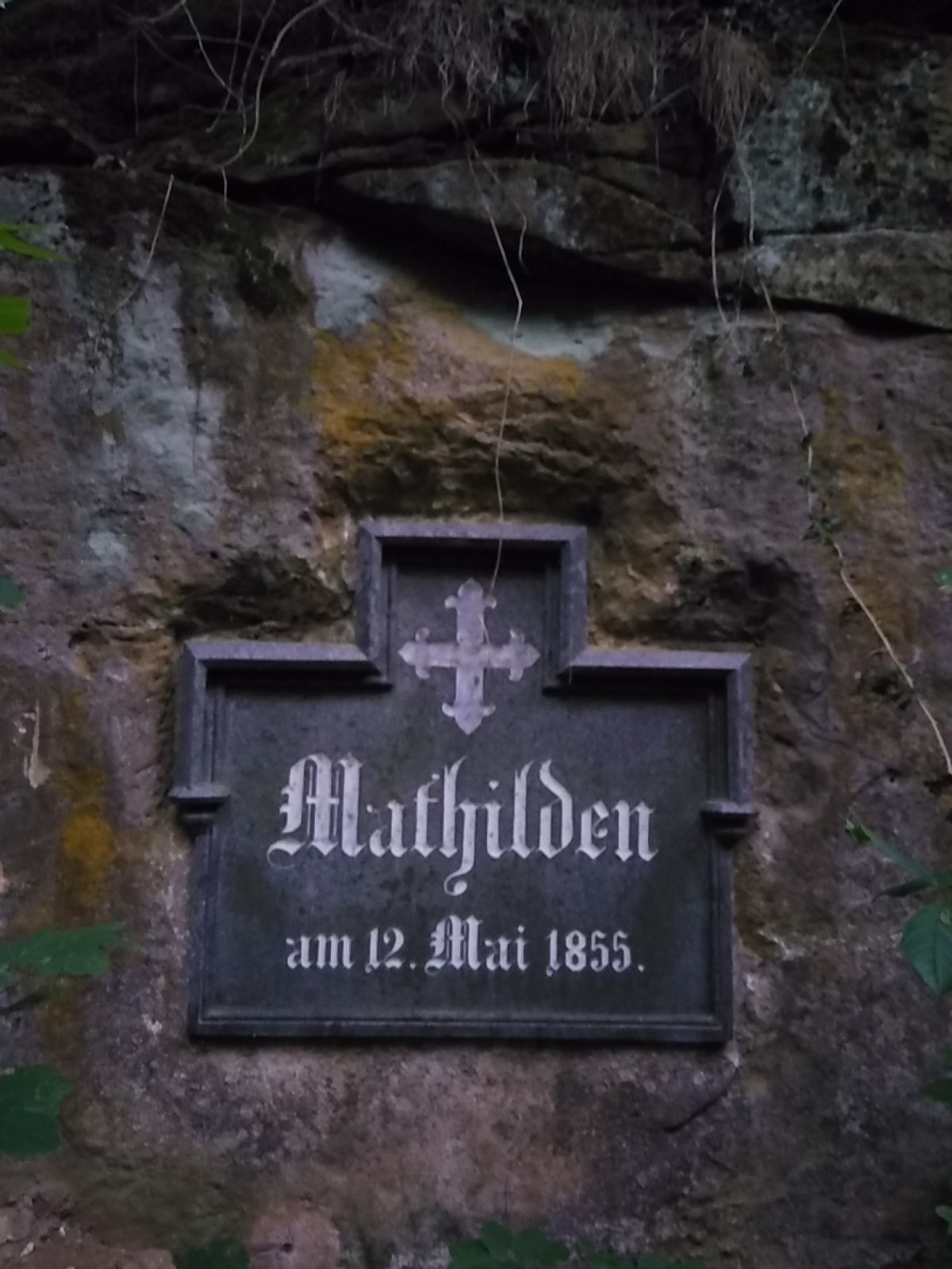 Gedenktafel an der Aussenseite der nördlichen Mauer von Schloss Rathsberg